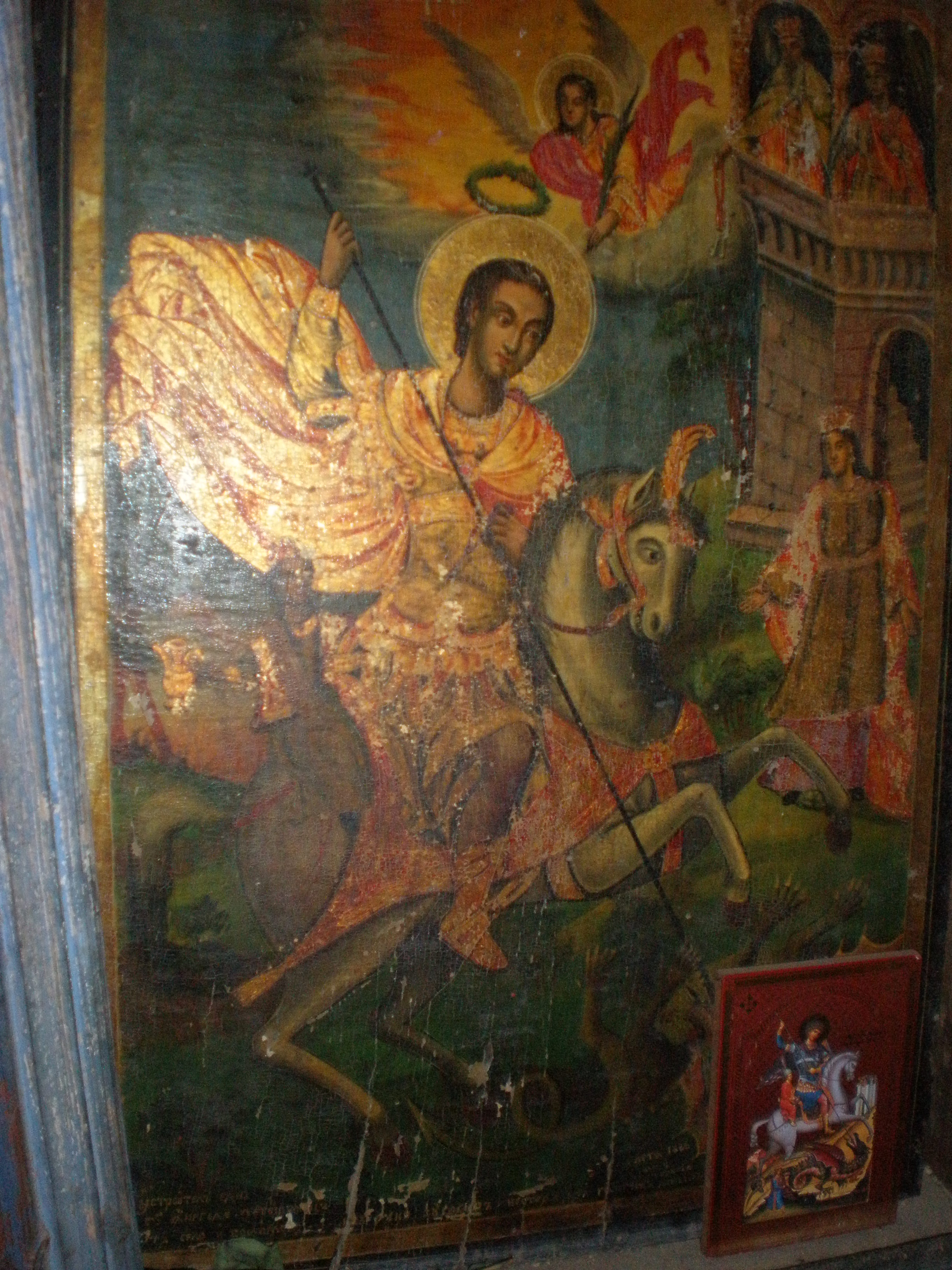 Иконата на Свети Георгиј во Блаце